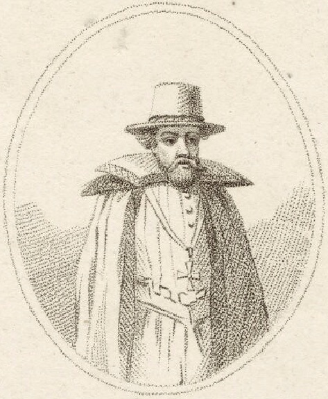 Everard Digby in wiki